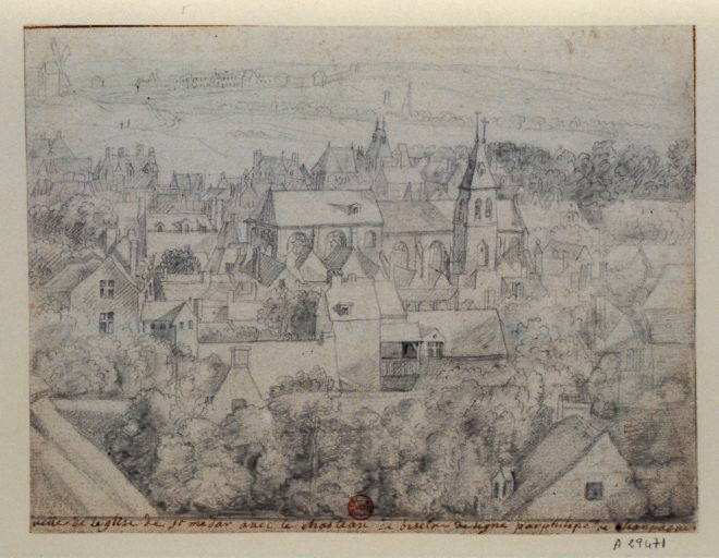 Veüe de leglise de St médar avec le chasteau de bisetre (sic)